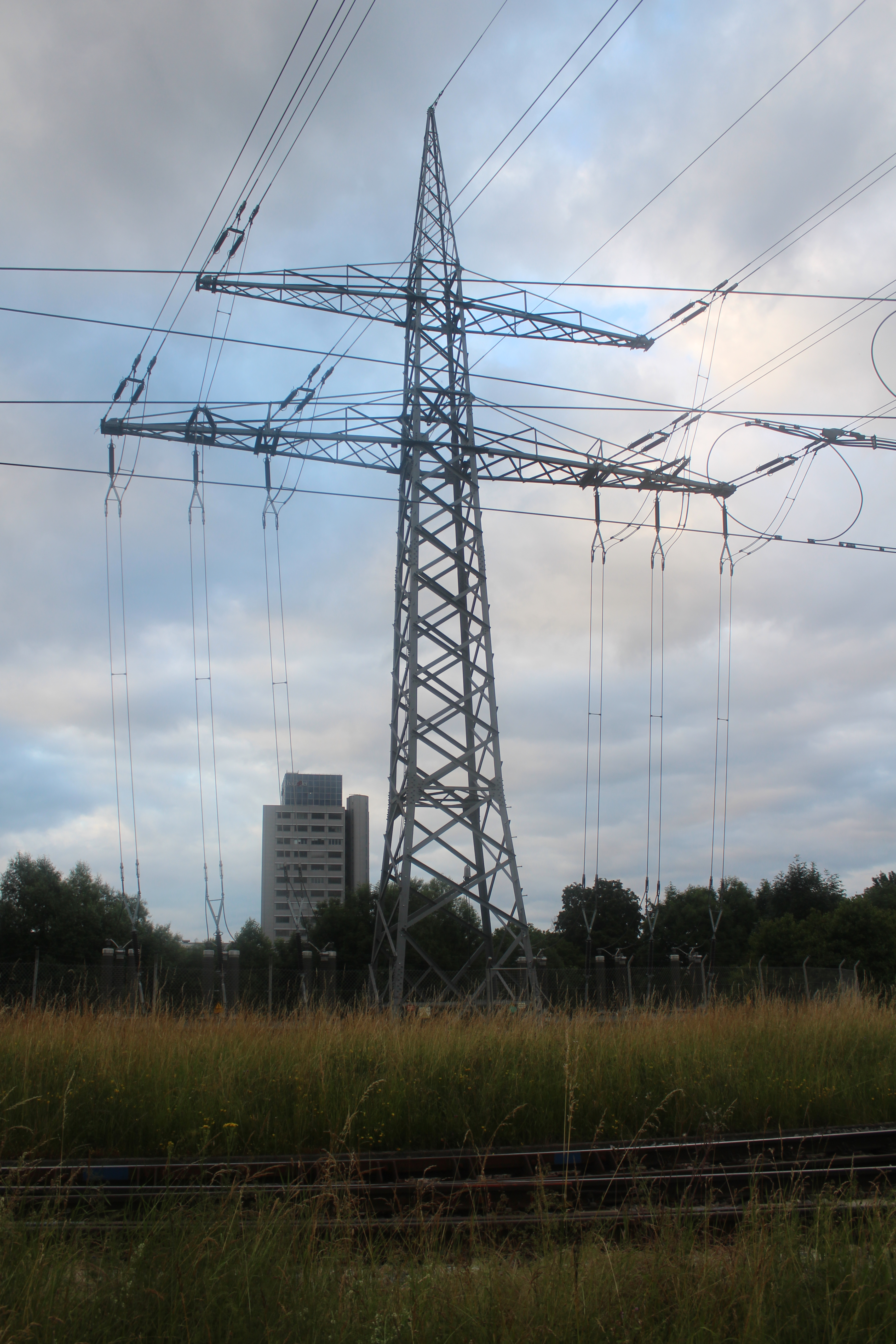 Anlage 306, Mast 72 - Endmast der Hochspannungsleitung Wendlingen–Möhringen, die ursprünglich mit 220 kV, heute aber nur noch mit 110 kV betrieben wird